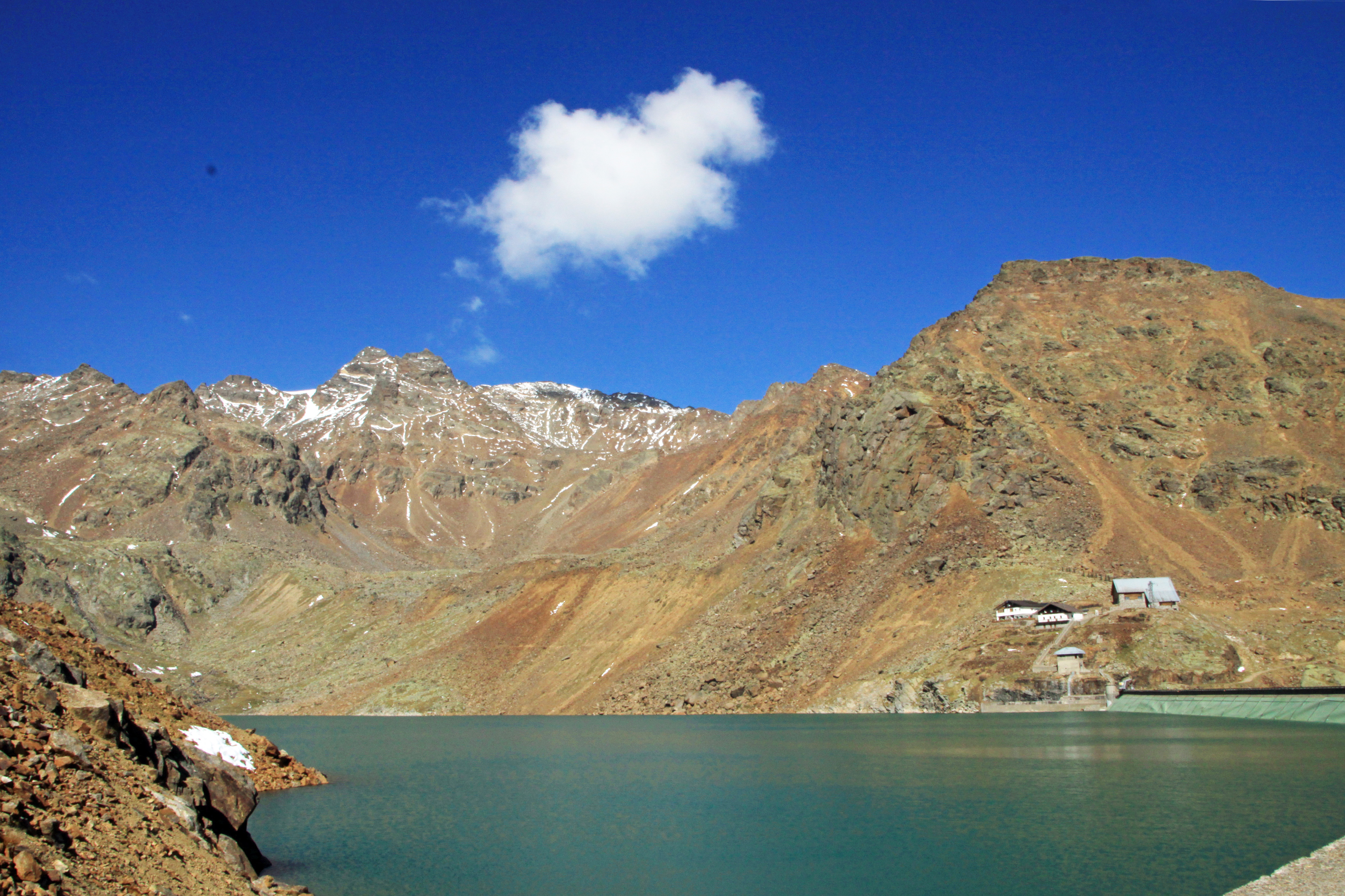 Grünsee mit Höchster Hütte (rechts) und Materialseilbahn